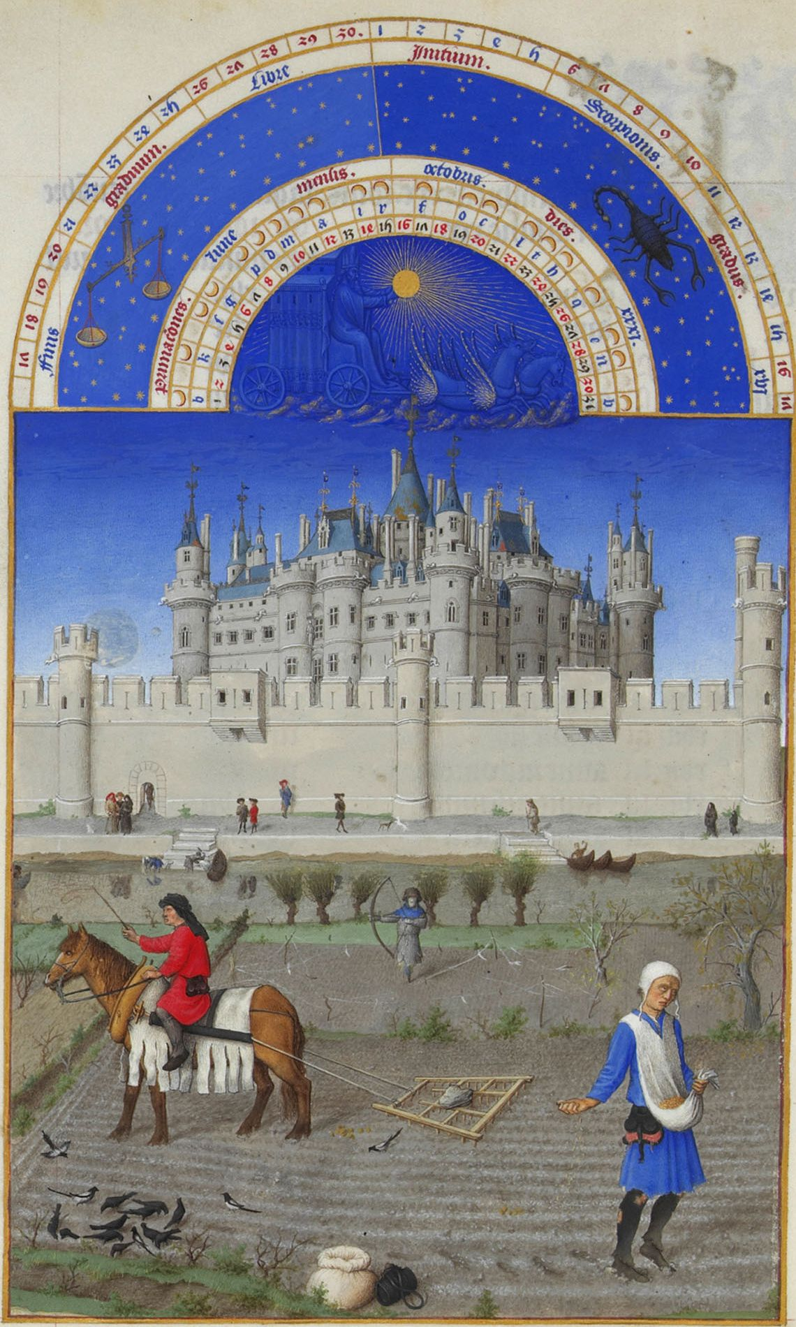 La scène paysanne du premier plan représente les semailles. À droite, un homme sème à la volée. Des pies et des corneilles picorent les graines qui viennent d'être semées, à proximité d'un sac blanc et d'une gibecière. Derrière, un épouvantail en forme d'archer et des fils tendus, sur lesquels sont accrochés des plumes, sont destinés à éloigner les oiseaux. À gauche, un paysan à cheval passe la herse sur laquelle est posée une pierre qui permet aux dents de pénétrer plus profondément dans la terre. Il recouvre ainsi les grains qui viennent d'être semés. À l'arrière-plan, le peintre a représenté le Palais du Louvre. Du château au centre, on distingue, outre le donjon central qui accueillait alors le trésor royal, la façade orientale à droite, encadrée par la tour de la Taillerie et la tour de la Chapelle, et à gauche la façade méridionale, avec ses deux tours jumelées au centre. L'ensemble est entouré d'une enceinte ponctuée de trois tours et de deux bretèches, visibles ici. Sur la rive, des personnages conversent ou se promènent.